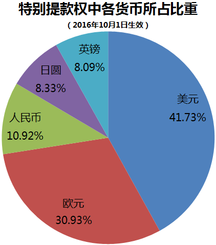 中文（中国大陆）: 特别提款權中各货幣所占比重